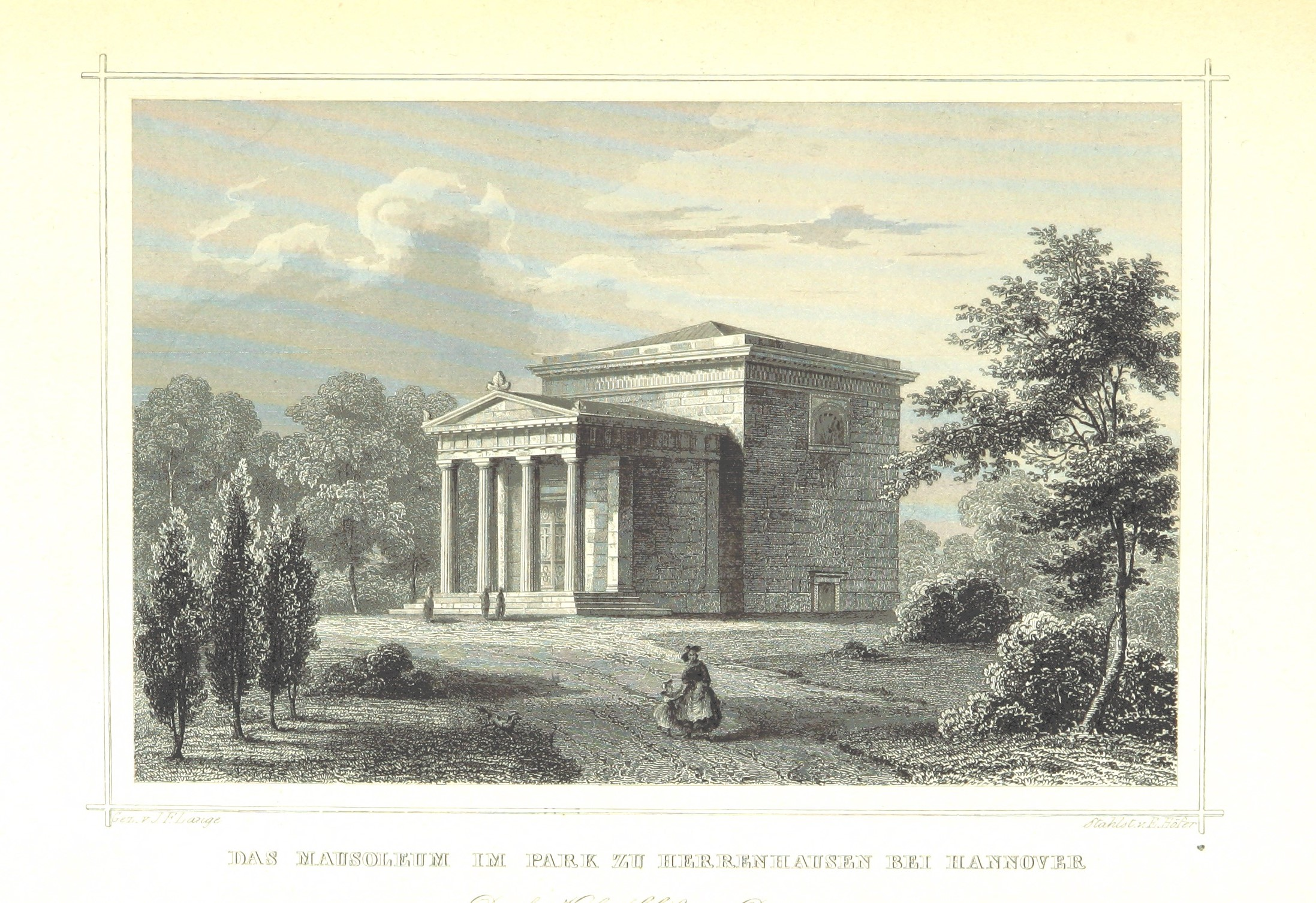 Das Welfenmausoleum, hier untertitelt als Das Mausoleum im Park zu Herrenhausen bei Hannover, Stahlstich von Ernst Höfer nach einer Zeichnung von J. F. Lange, abgebildet in dem Buch Das Königreich Hannover und das Herzogthum Braunschweig dargestellt in malerischen Original-Ansichten ihrer interessantesten Gegenden ... von verschiedenen Künstlern. Historisch und topographisch beschrieben von :de: Otto von Heinemann|Otto von Heinemann , Darmstadt 1858, hochgeladen von der British Library ...